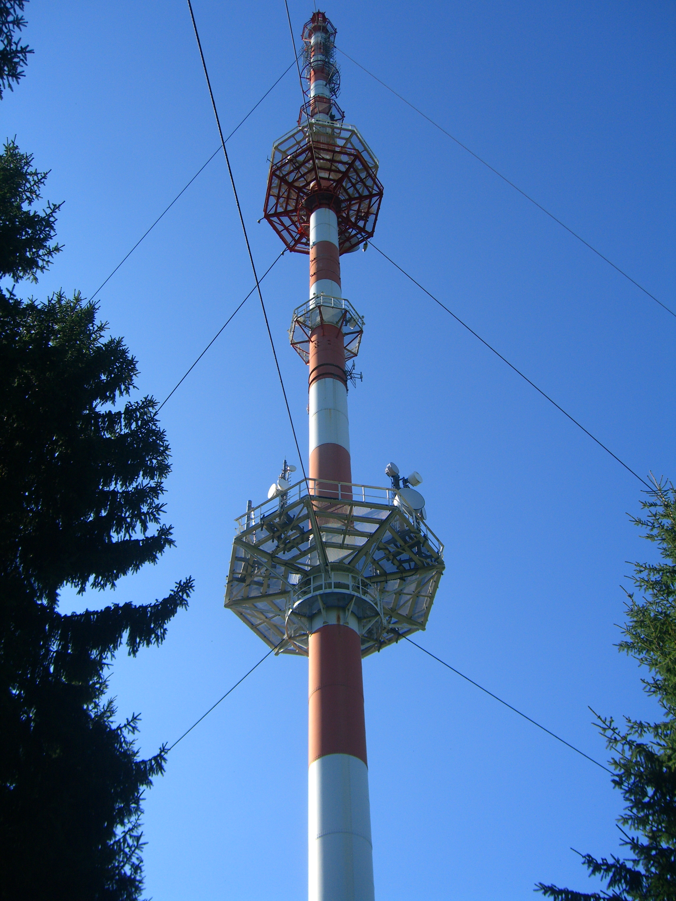 Sende-Anlage Högl